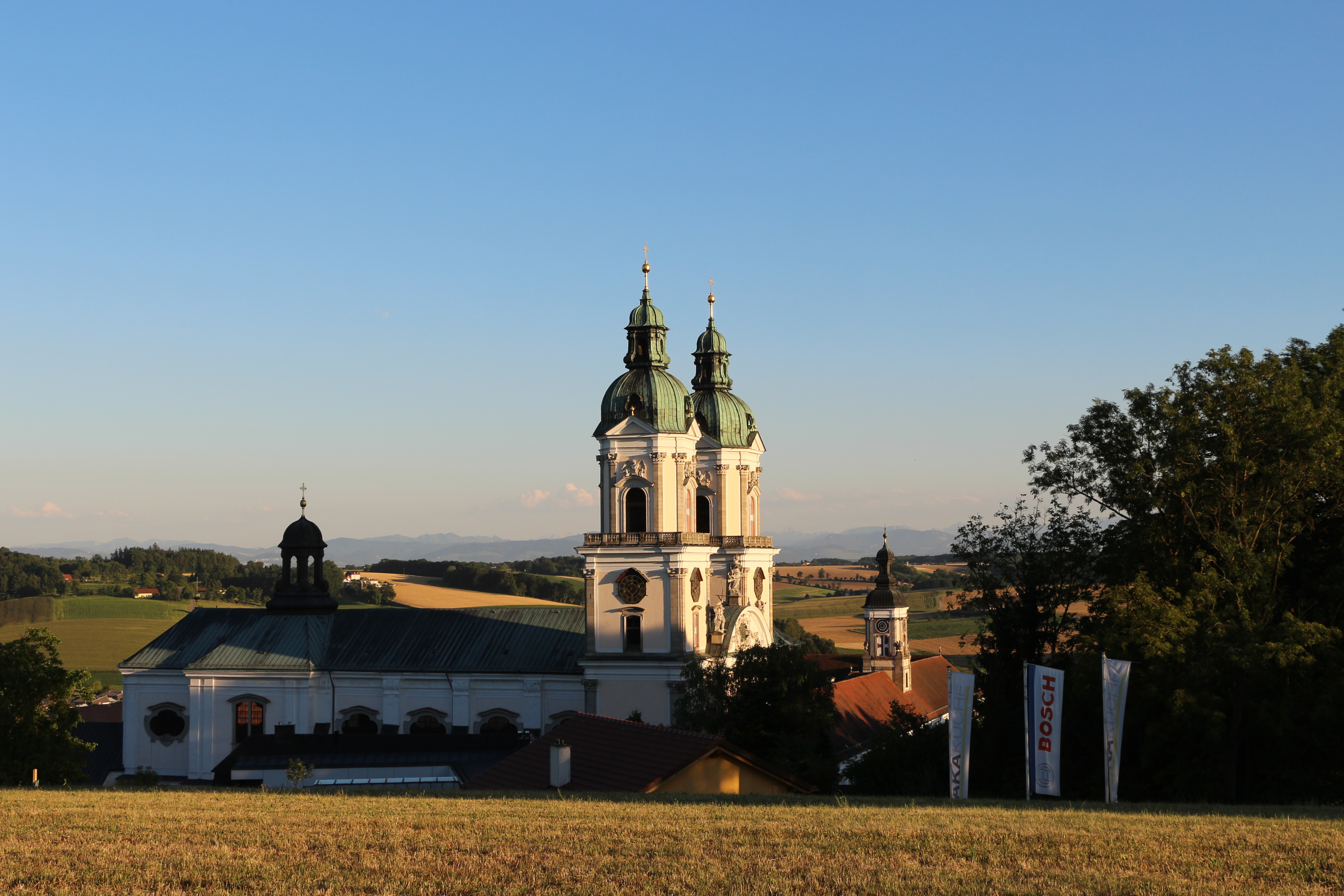 Gesamtanlage Augustinerchorherrenkloster